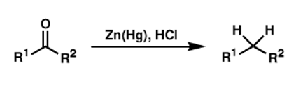 Aldehido baten erreakzioaren eskema orokorra